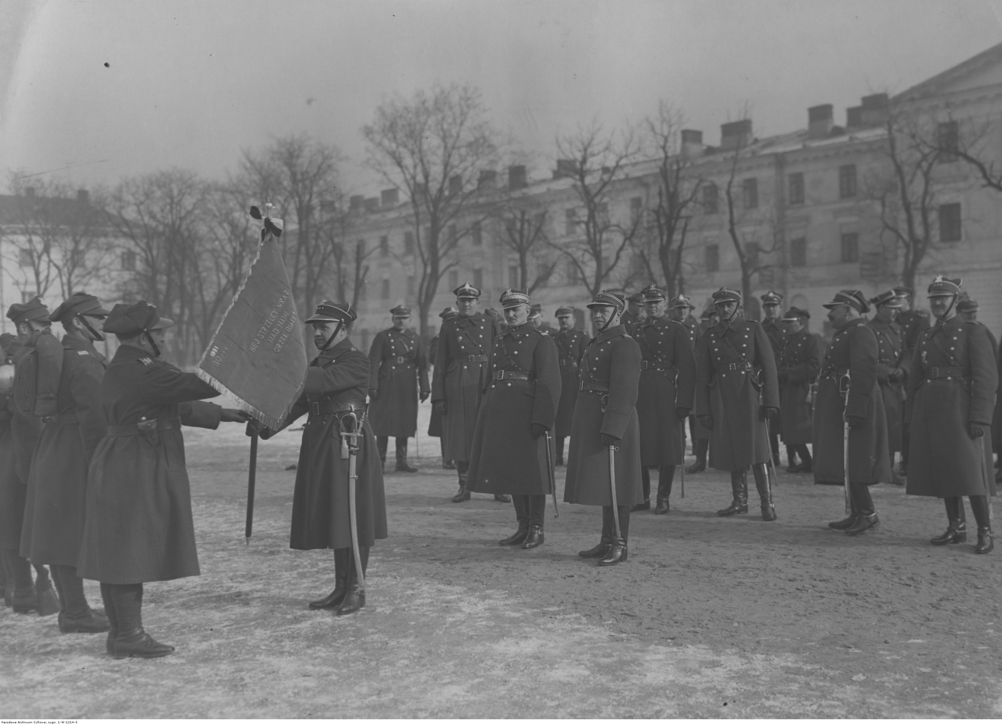 Wręczenie proporca 8 kompanii 30 Pułku Strzelców Kaniowskich za zdobycie I miejsca w zawodach strzeleckich 10 Dywizji Piechoty. Dowódca 8 kompanii kpt. Sikorski wręcza propoprzec wachmistrzowi. Widoczni także m.in. gen. Józef Olszyna-Wilczyński, mjr Mikoś, płk Mieczysław Pereświet-Sołtan. Koncern Ilustrowany Kurier Codzienny - Archiwum Ilustracji. Sygnatura: 1-W-1214-3